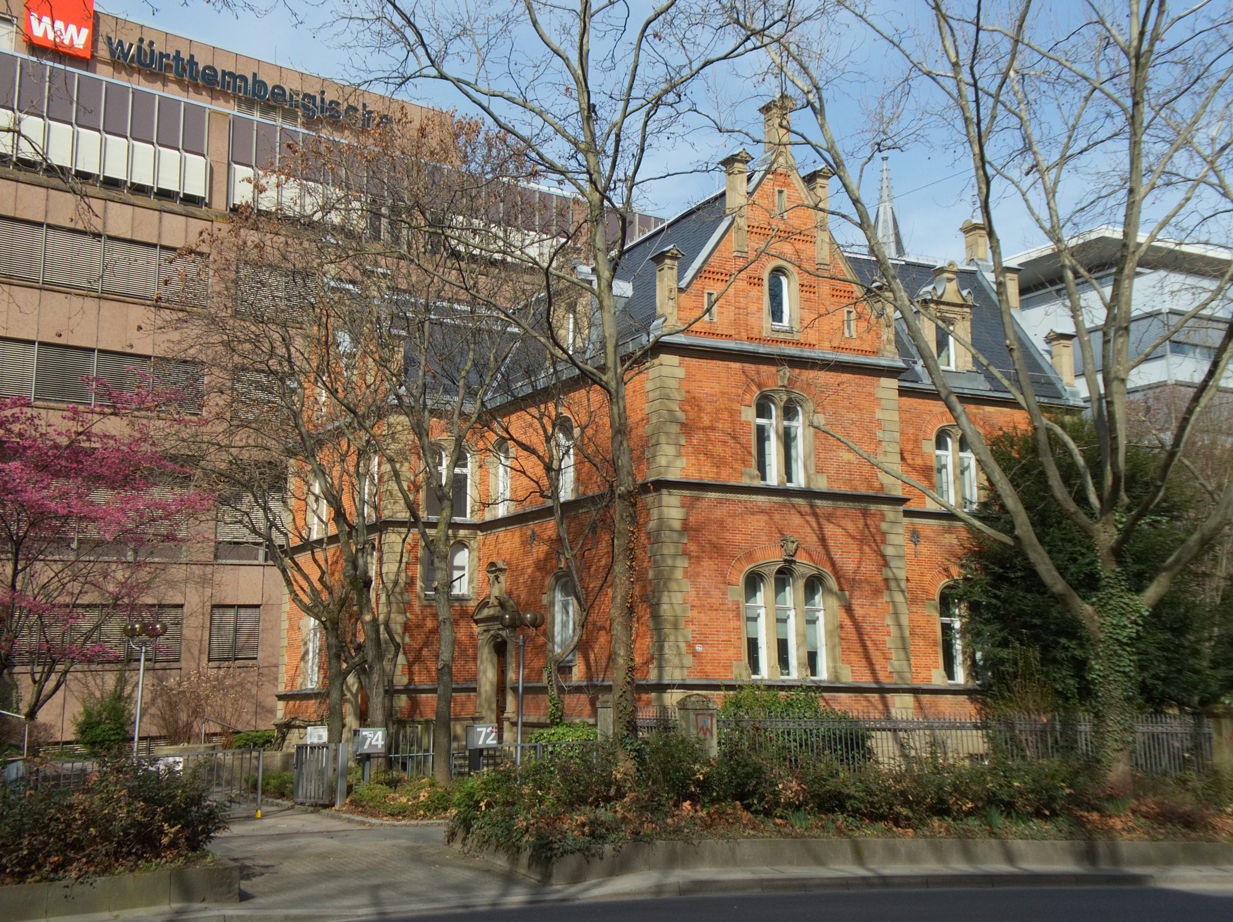 Ehemalige Villa Knosp, Rotebühlstraße 72, Stuttgart. Erbaut 1859 von Joseph von Egle im Stil der Englischen Landhausarchitektur/niederrheinischen Baukunst. Geschützt nach § 2 DSchG.